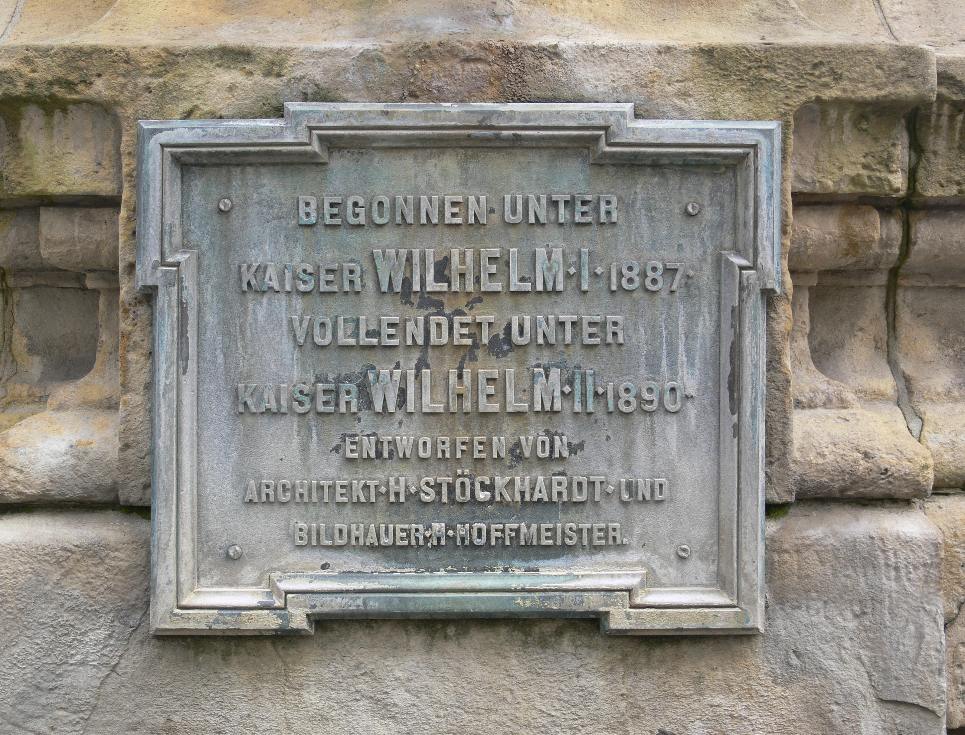 Alter Angerbrunnen am westlichen Ende des Angers in Erfurt